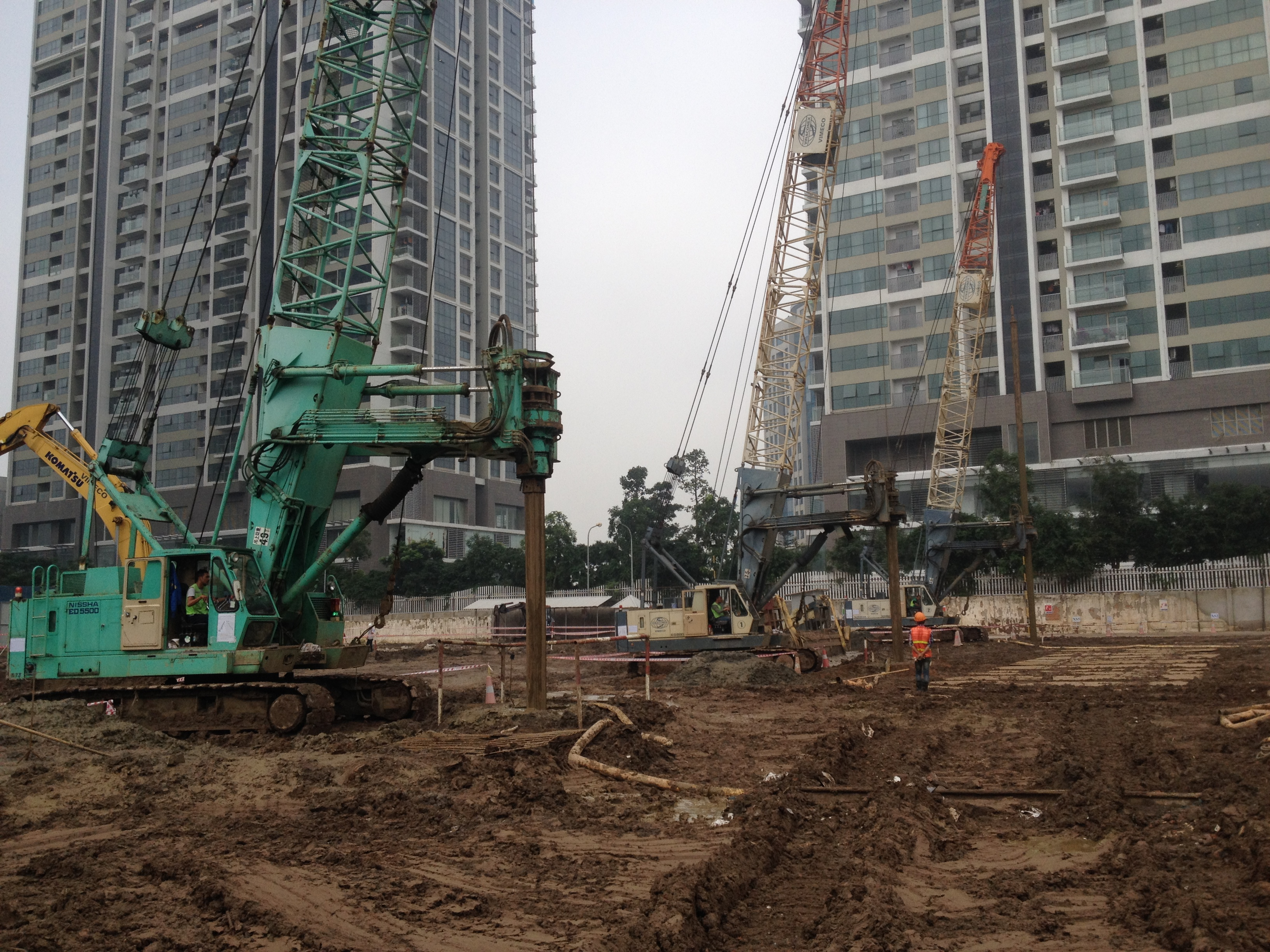 Máy khoan cọc nhồi Nhật Bản ED5500